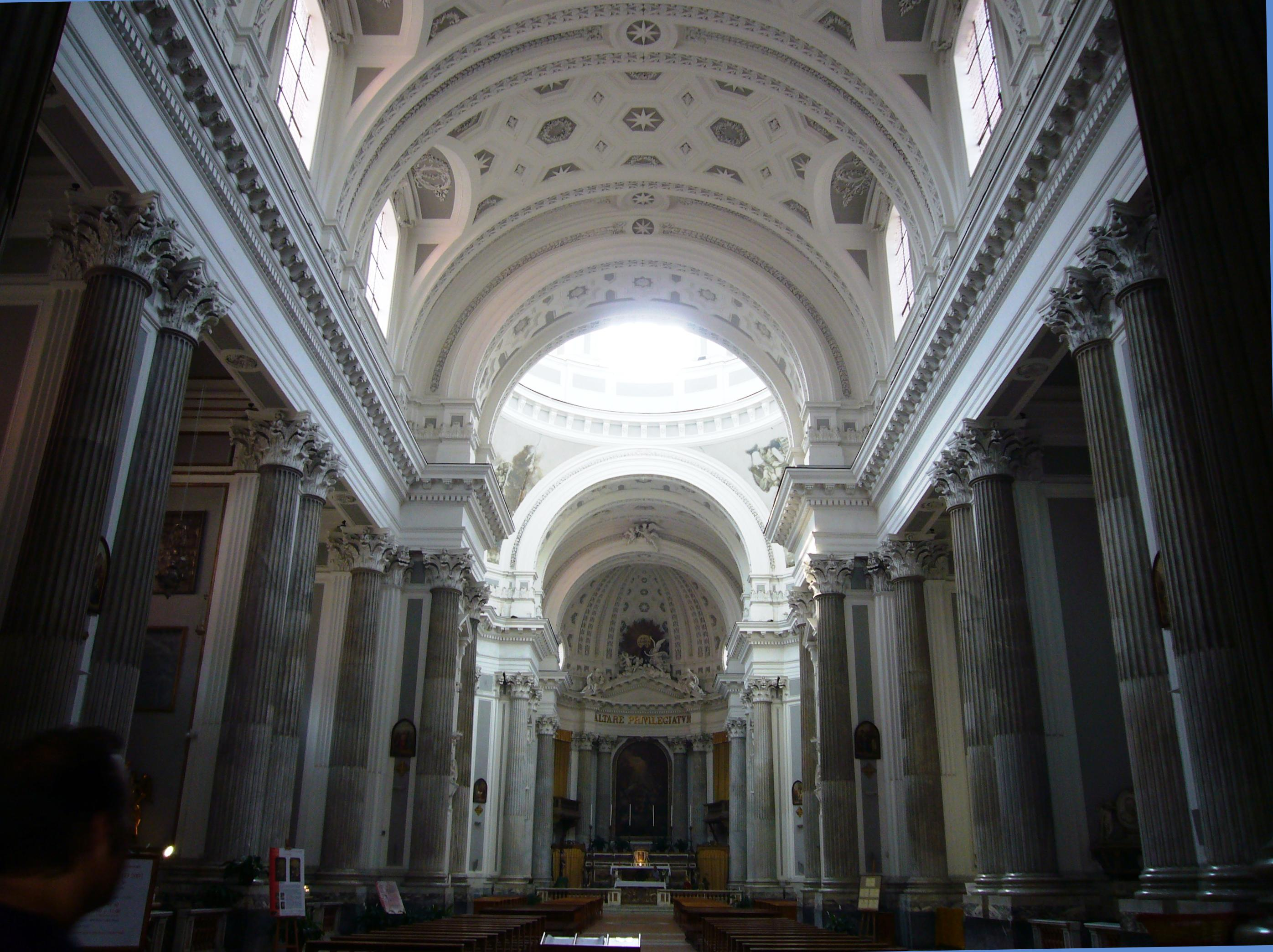 Napoli, Santissima Annunziata Maggiore, interno